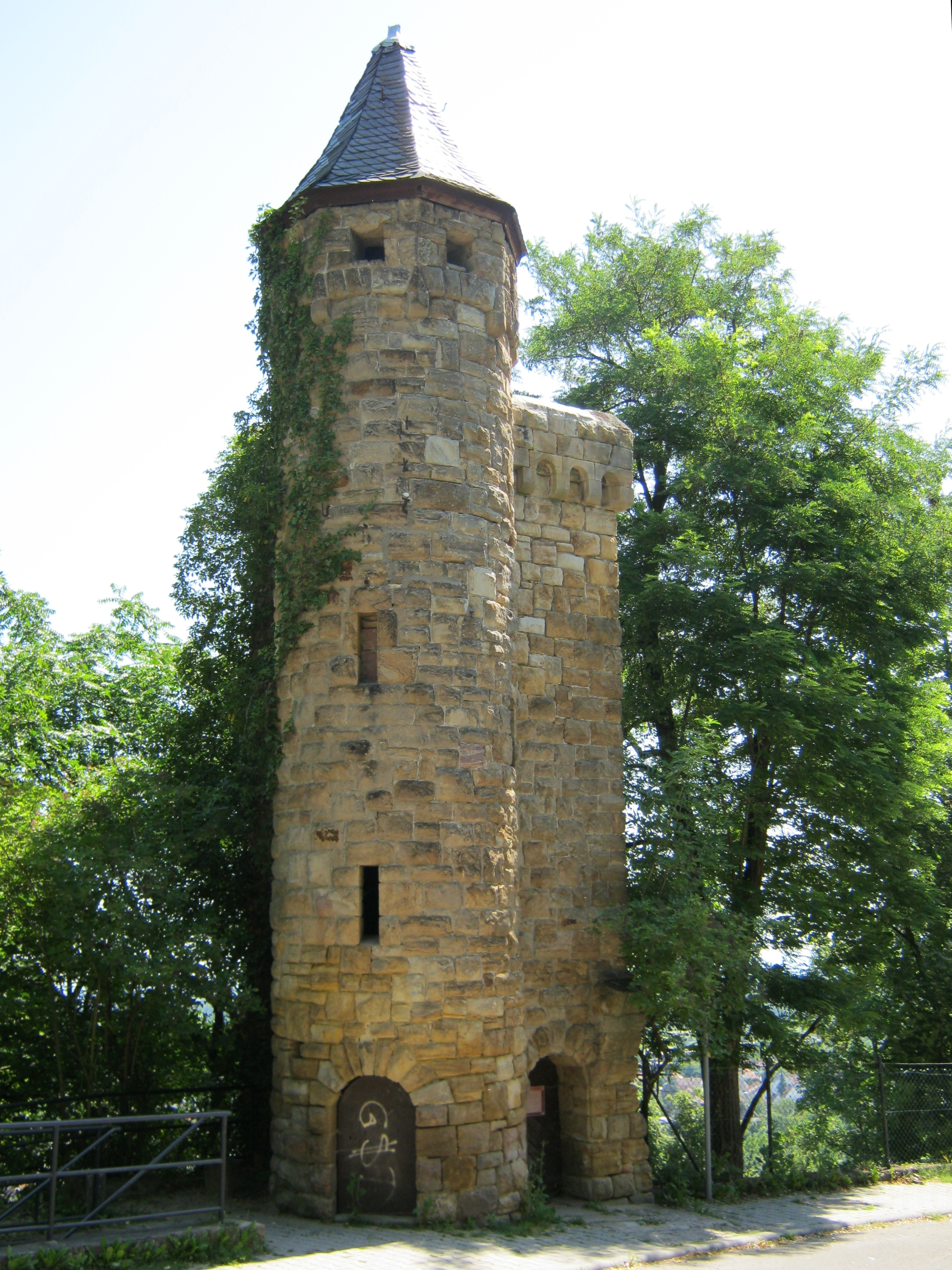 Der Ruprechtsturm von Oppenheim in Rheinhessen (Rheinland-Pfalz)